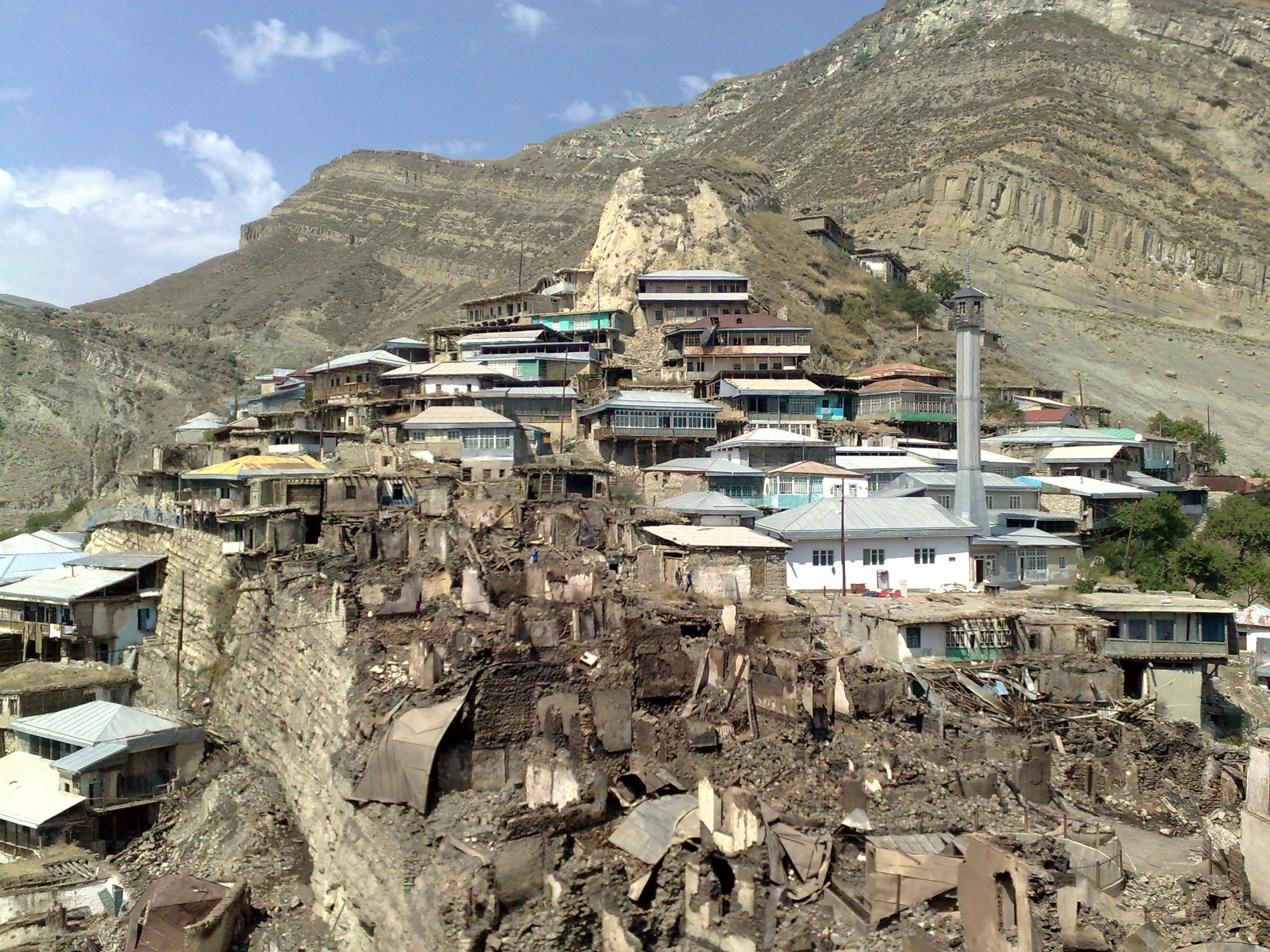 Руины, оставшиеся после страшного пожара, который уничтожил старинную часть села Анчих с уникальной архитектурой 5 августа 2010 года.